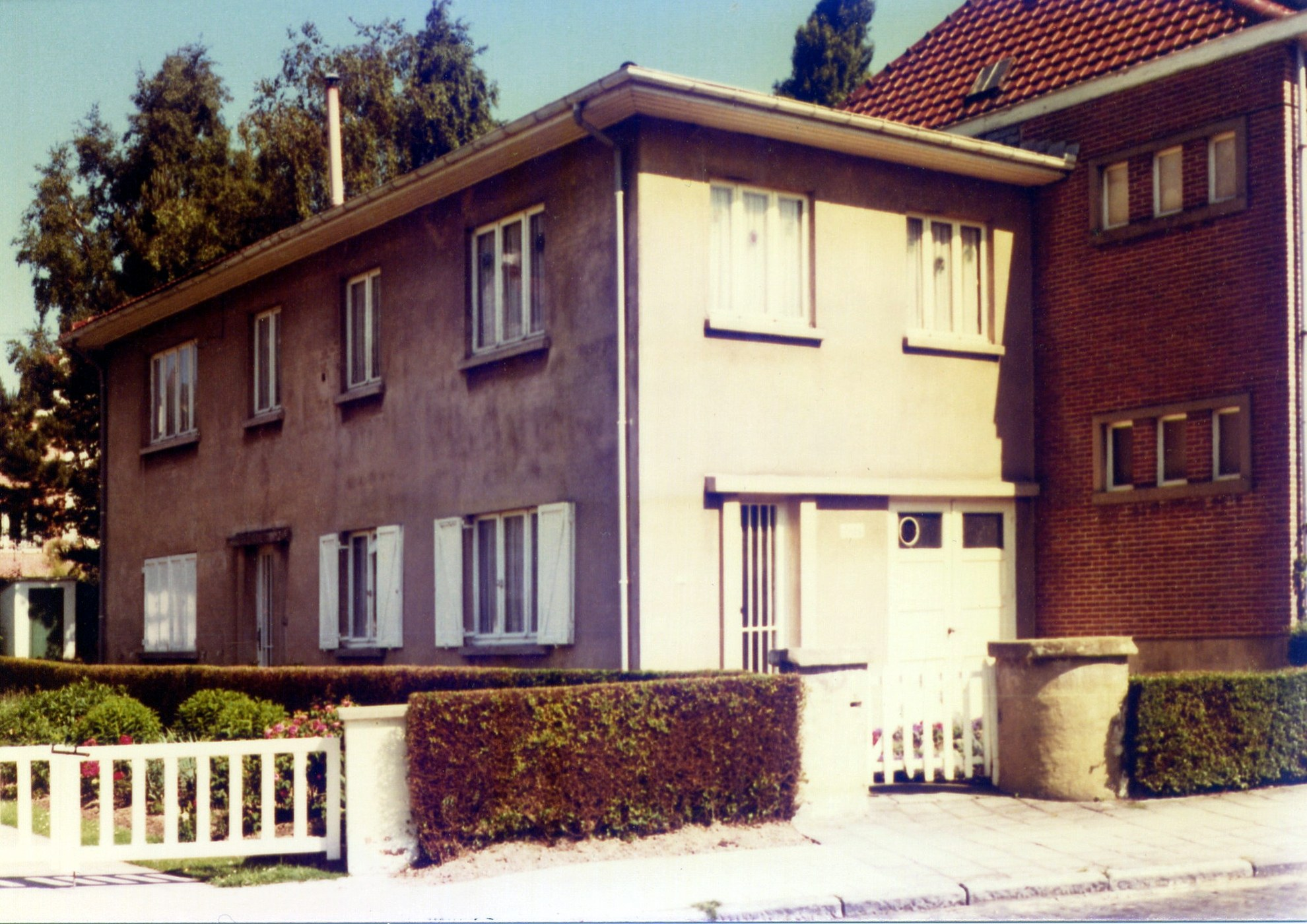 Maison semi-préfabriquée à Uccle, rue Langeveld, propriété de M Durdut, année 1946.